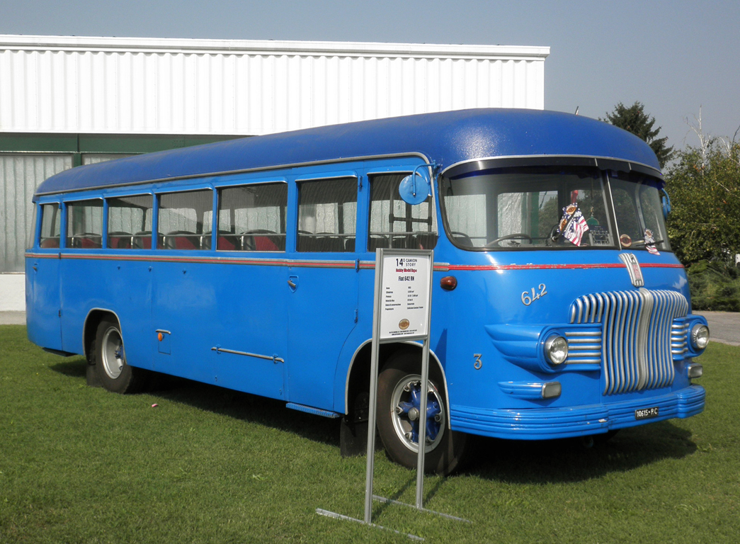 Autobus FIAT 642 RN esposto alla fiera Hobby Model Expo di Novegro del 2011